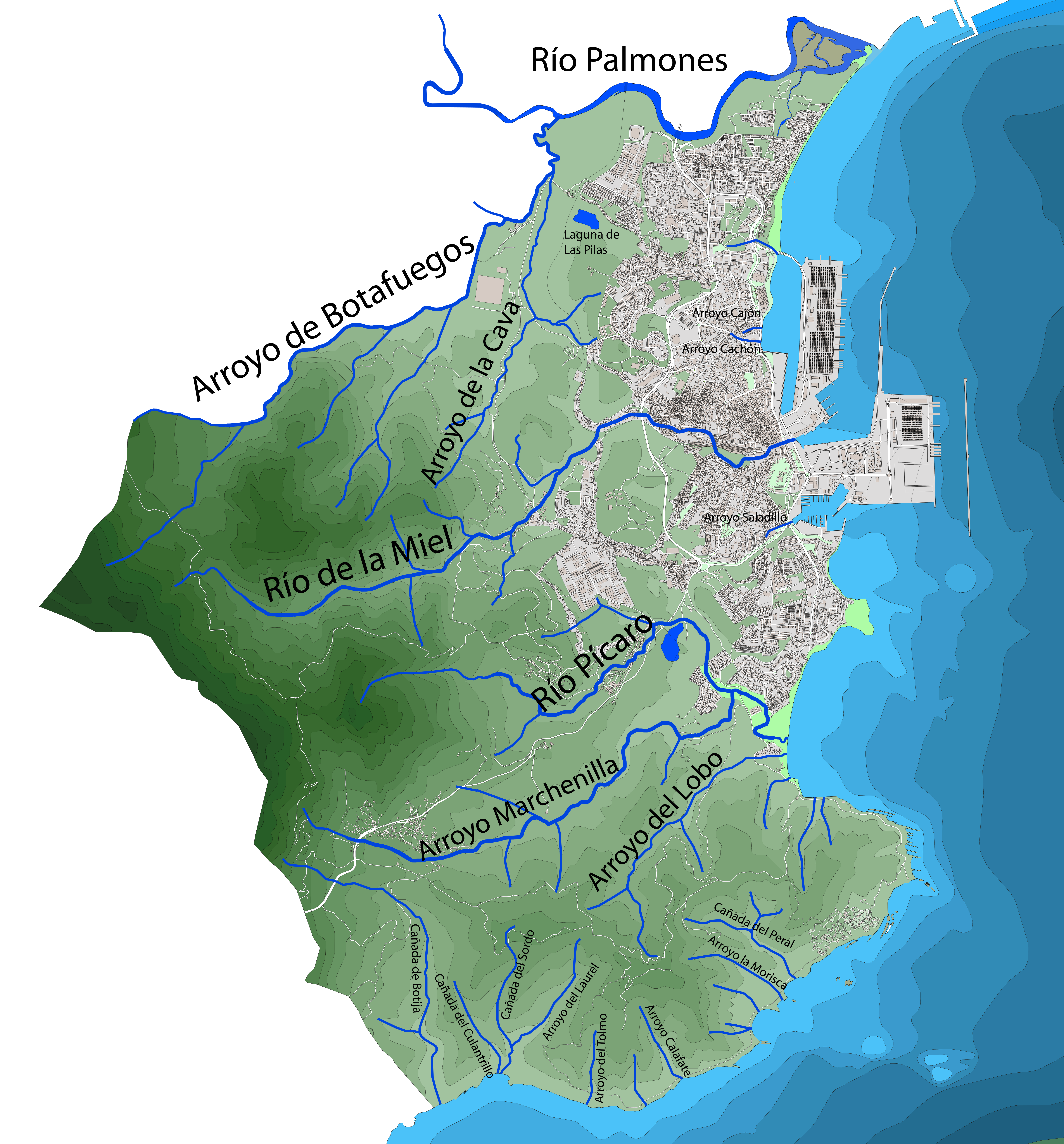 Mapa del término municipal de Algeciras indicando su hidrología. Algeciras, Andalucía, España.